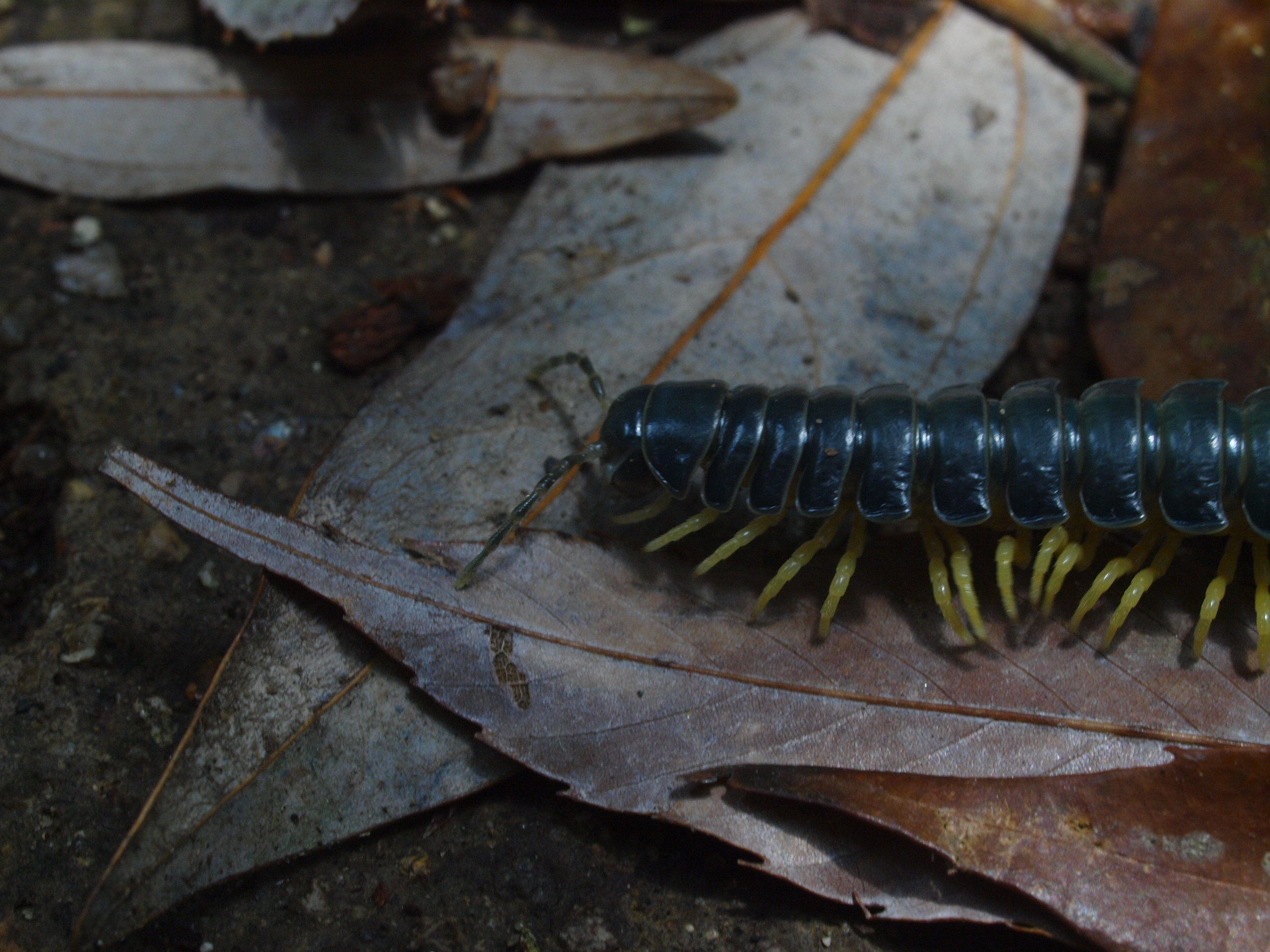 ミドリババヤスデ? 厳島（広島県廿日市市）にて。 cf. the photographer's blog.